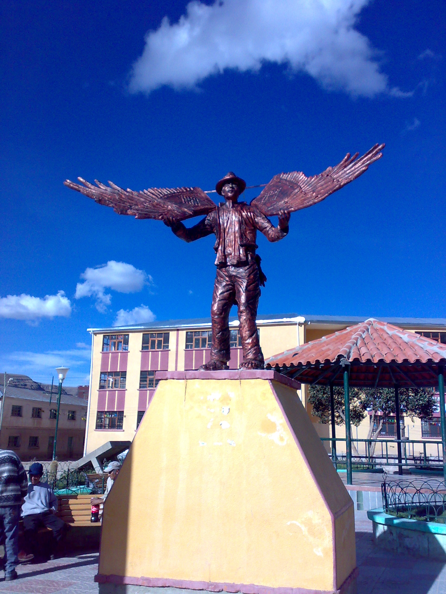 Monumento ubicado en la Plaza Central de Porco que representa al poblador originario de Porco, con su traje típico.